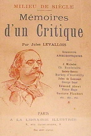 Mémoires d'un critique (1896) by French writer Jules Levallois (1829-1903)